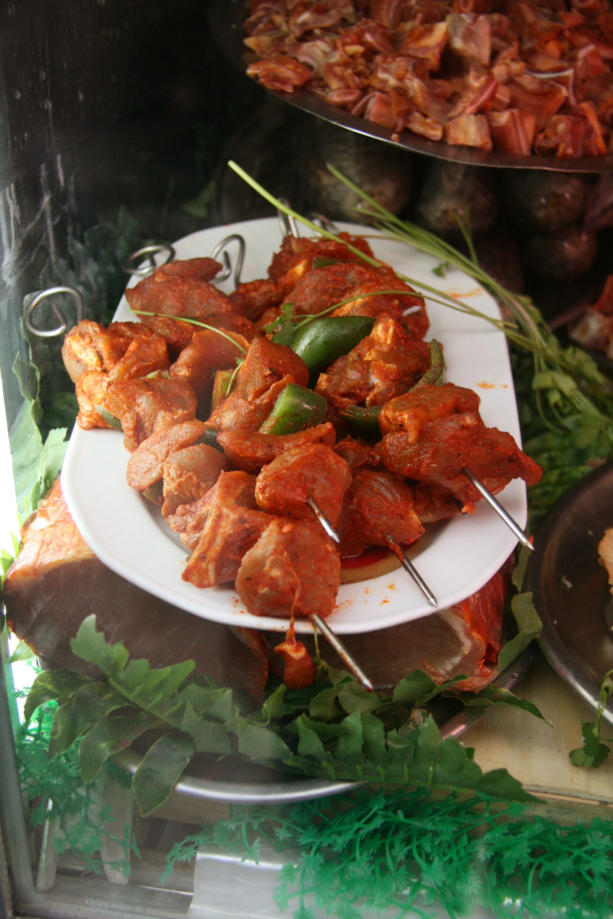 Pinchos morunos - crudos